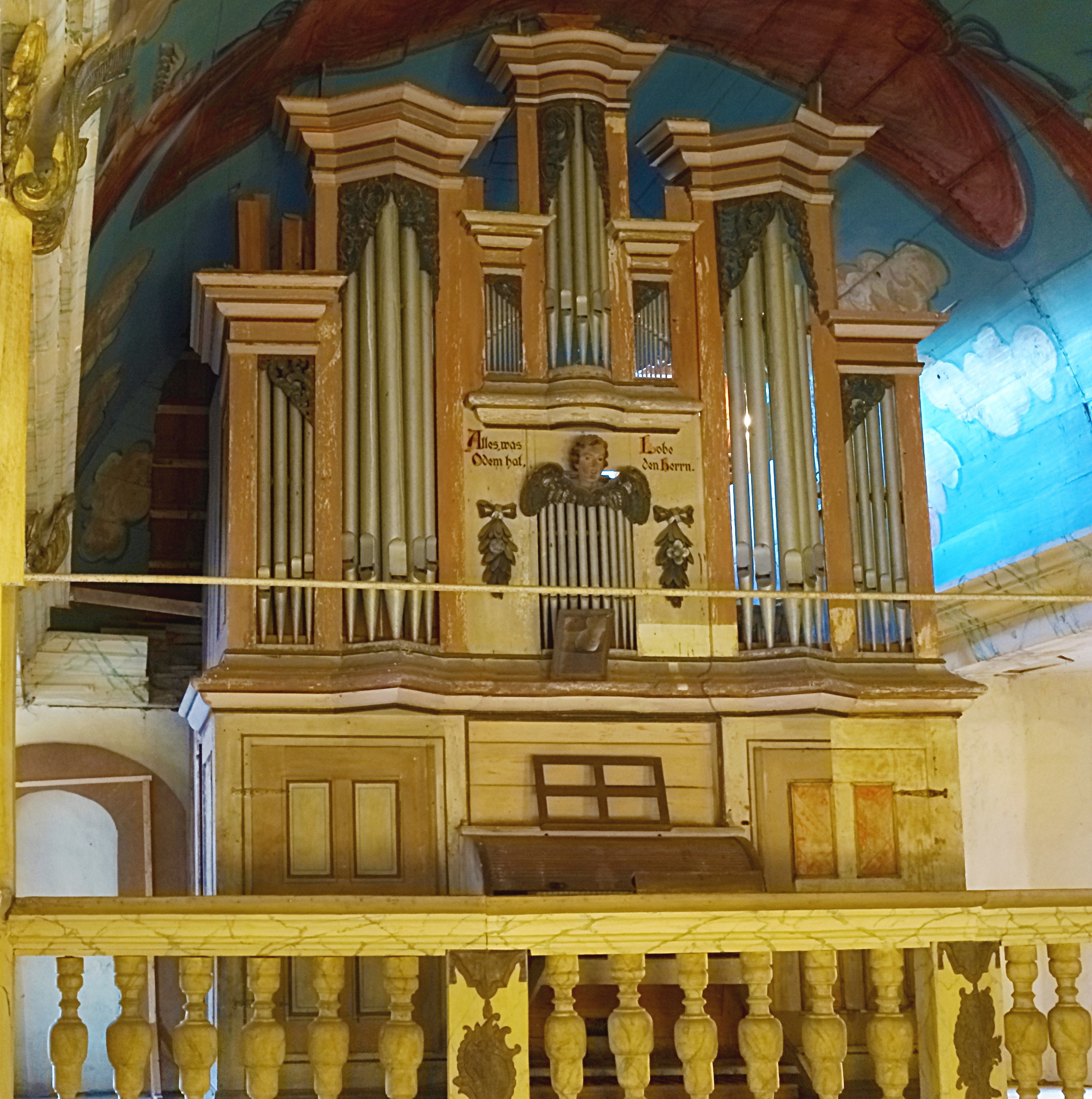 Friedrich Wilhelm Böttchers Orgel (1927) im alten Gehäuse von (1728), das Bildhauer Klemm aus Clingen für Johann Michael Hartung (1702–1777) gefertigt hatte. Die Orgel ist nicht mehr spielbar.